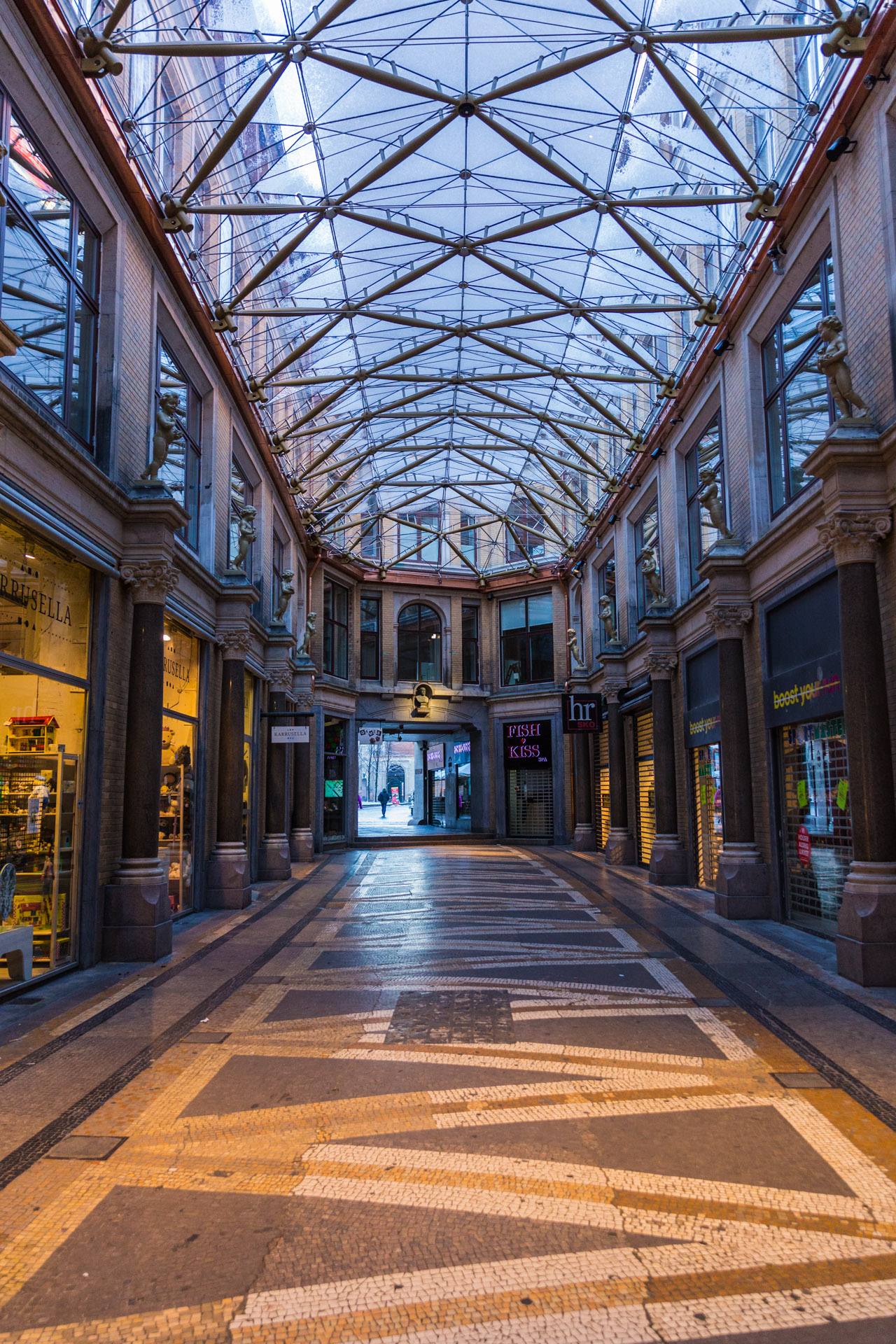 Jorcks Passage in Copenhagen, Denmark